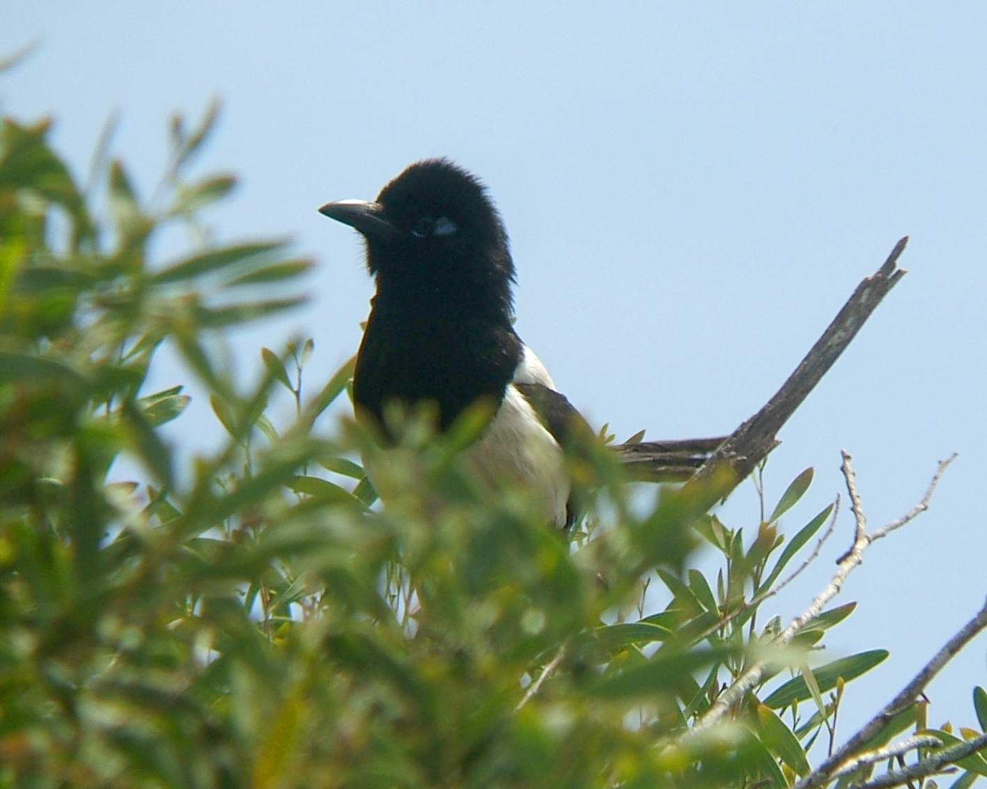 Pica pica mauretanica, Oued Massa National Park, Morocco